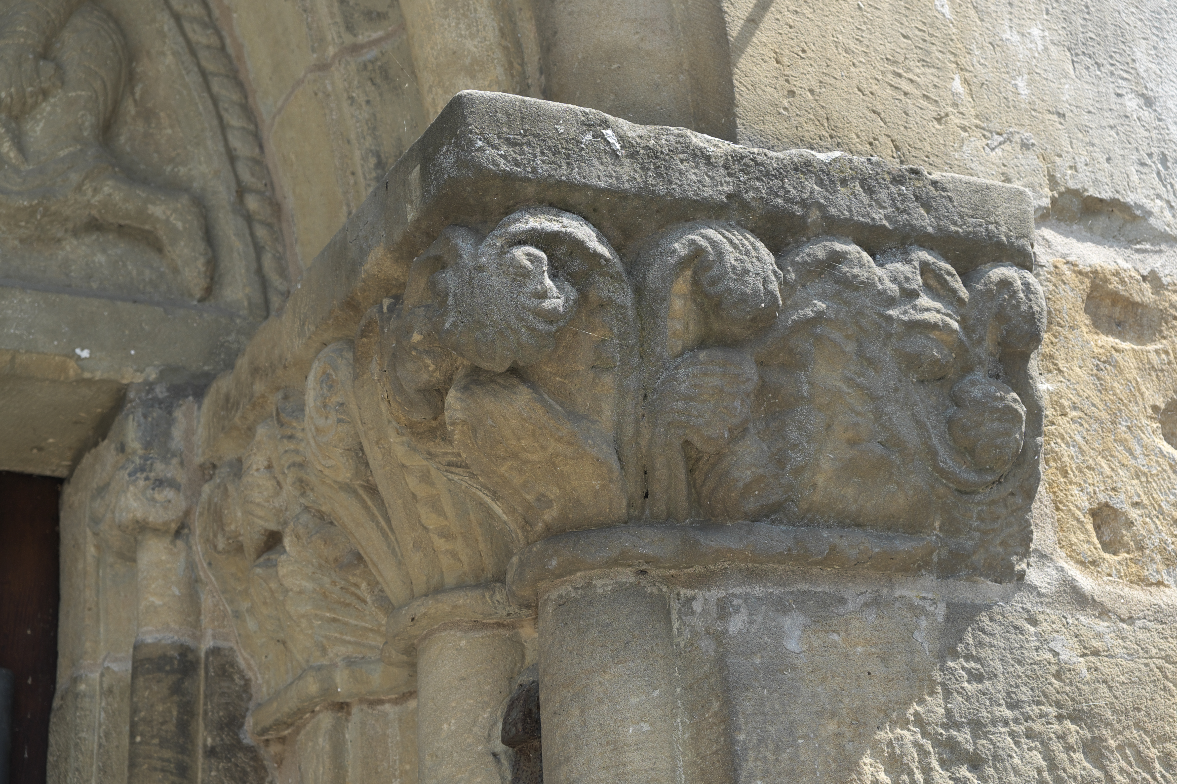 Evangelische Laurentiuskirche in Niedernhall im Hohenlohekreis (Baden-Württemberg), Blattkapitelle am Hauptportal